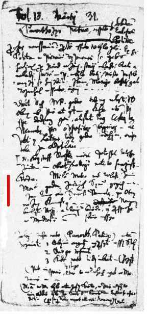 J. A. Comenius: Clamores Eliae művének 137. lapjához fűzött d betétlap hátsó oldala